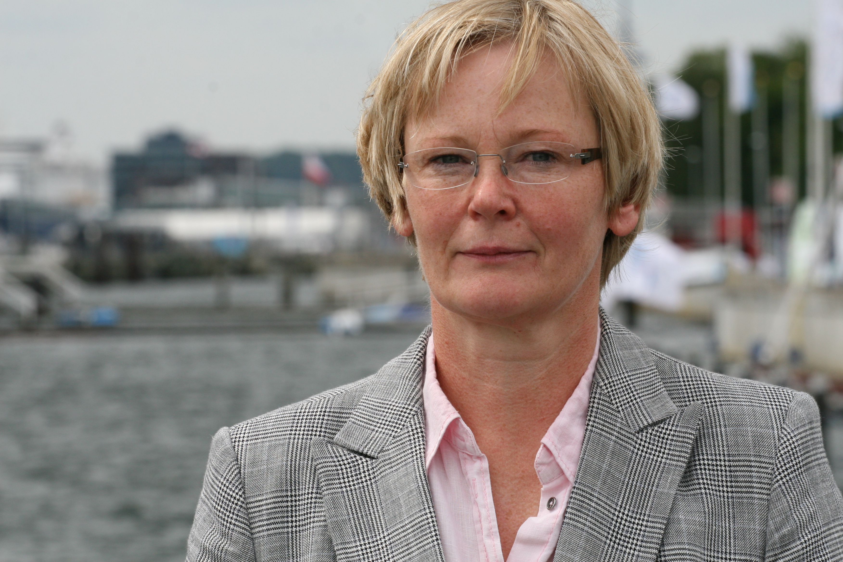 Anette Langner